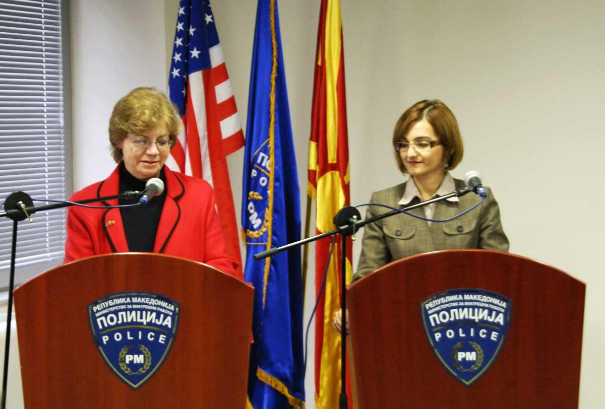 Обраќање на Амб. Миловановиќ и Министерката на МВР Јанкуловска на церемонијата на донација во опрема и матерјали на МВР